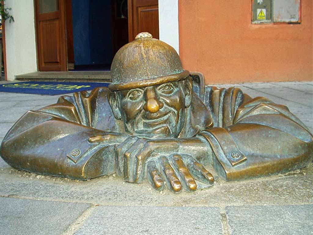 Čumil: jedna z najznámejších a najfotografovnejších sôch z ulíc starého mesta v Bratislave.